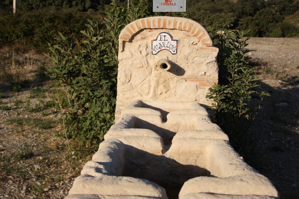 Pilar